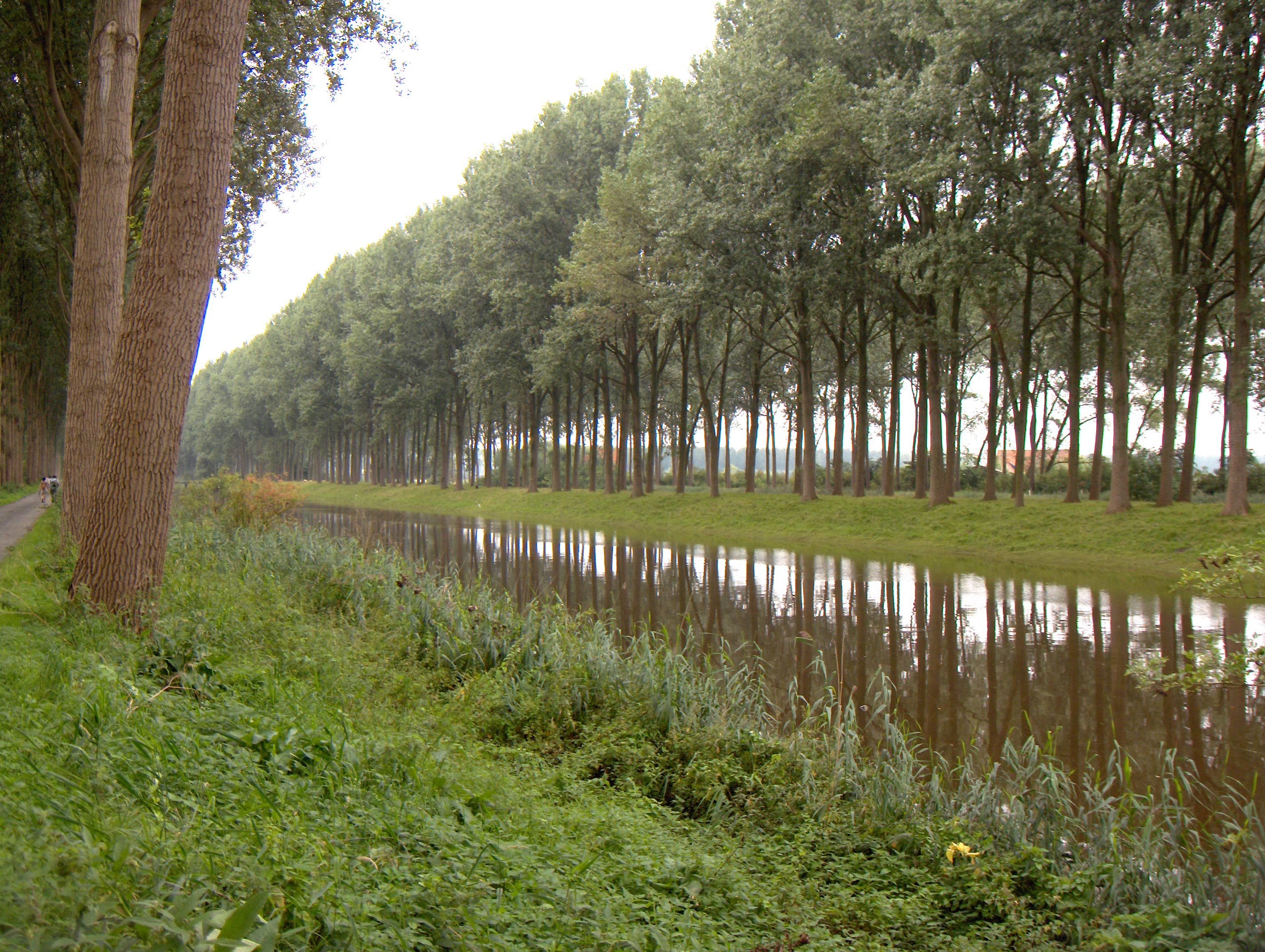 Schipdonkkanaal, traject tussen Moerkerke en de brug op de weg Damme - Lapscheure (op de achtergrond de bomenrijen langs het parallelle Leopoldskanaal)